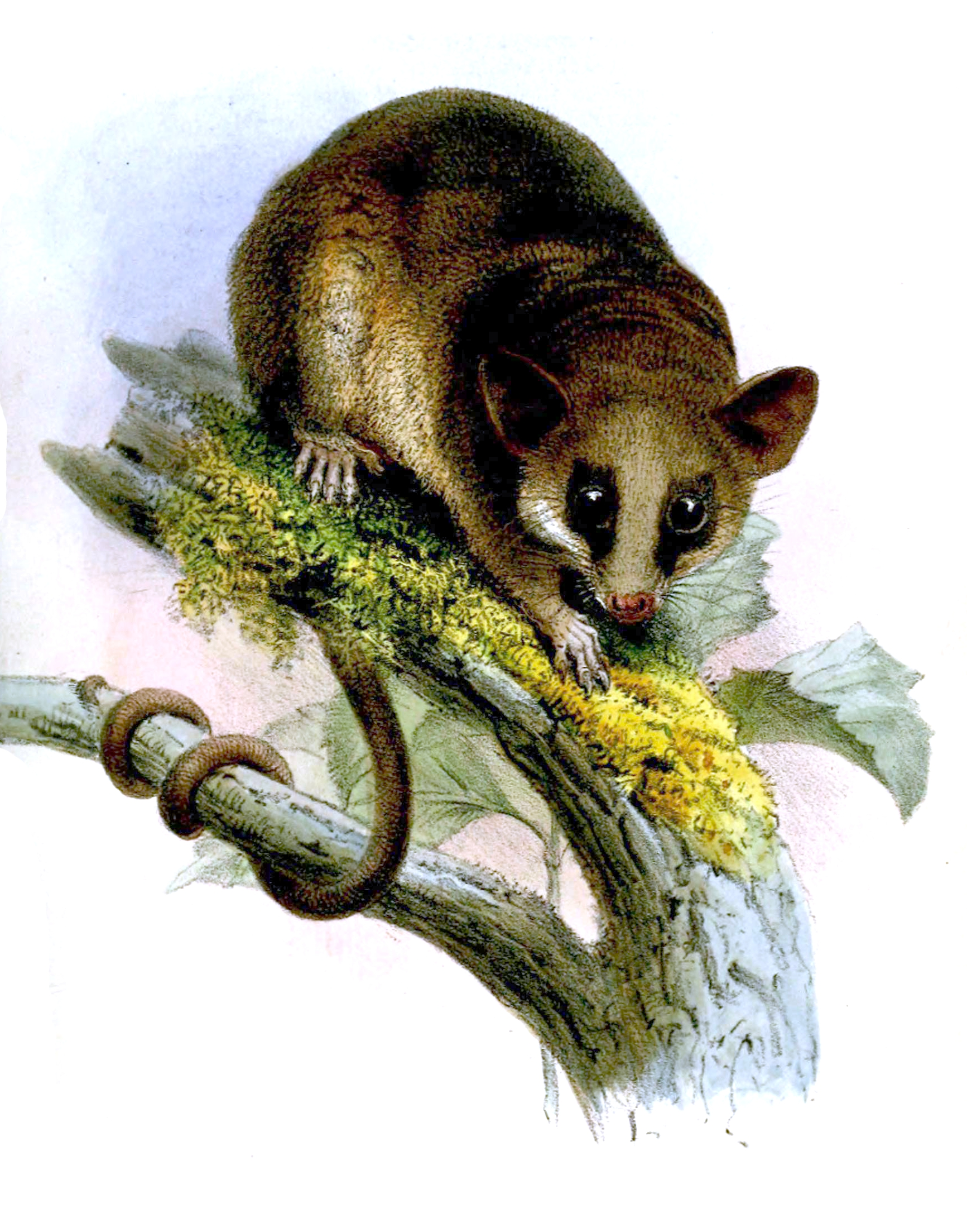 Didelphys waterhousii = Marmosa waterhousei